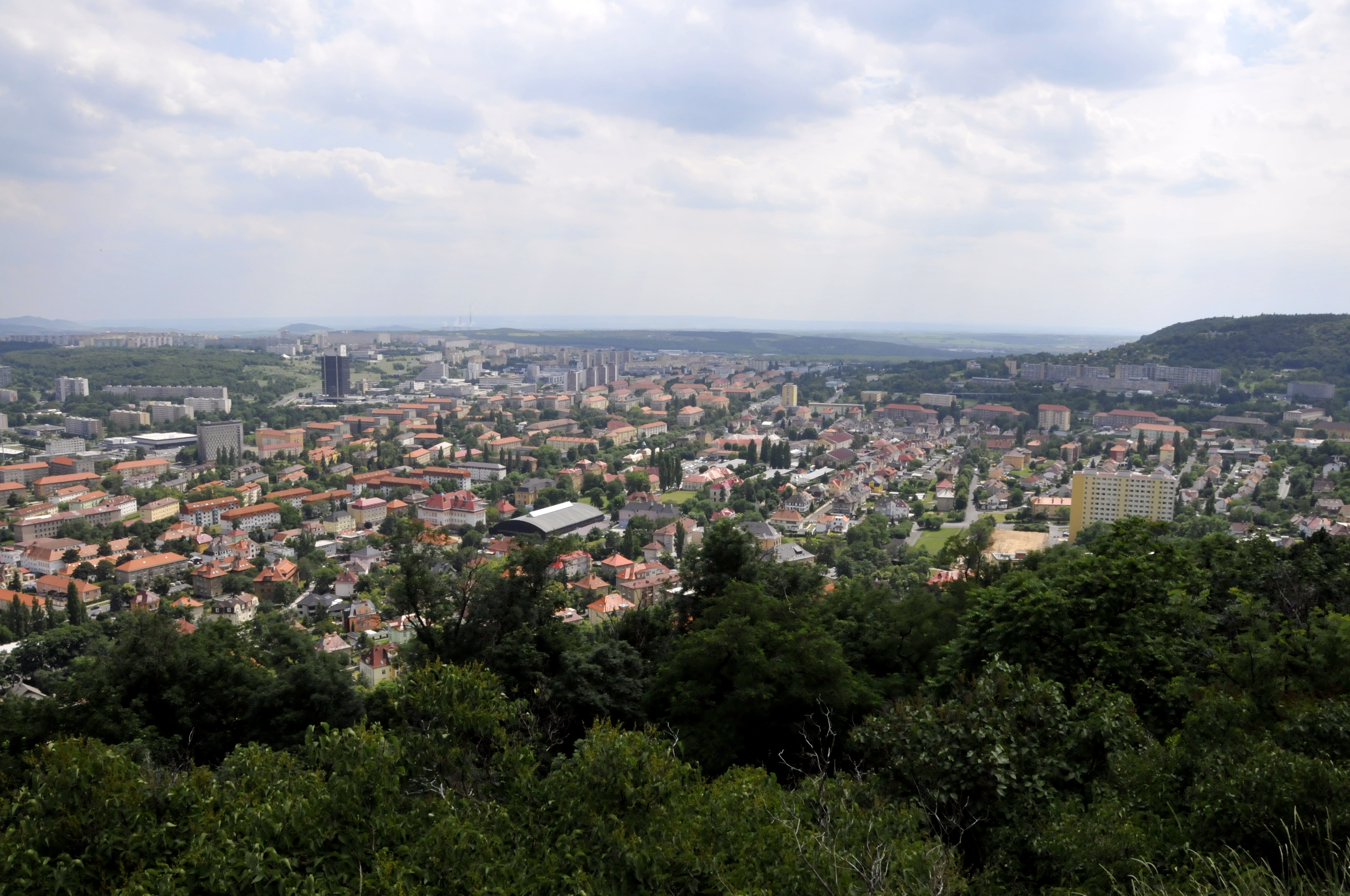 Most, Blick von der Burg nach Südost